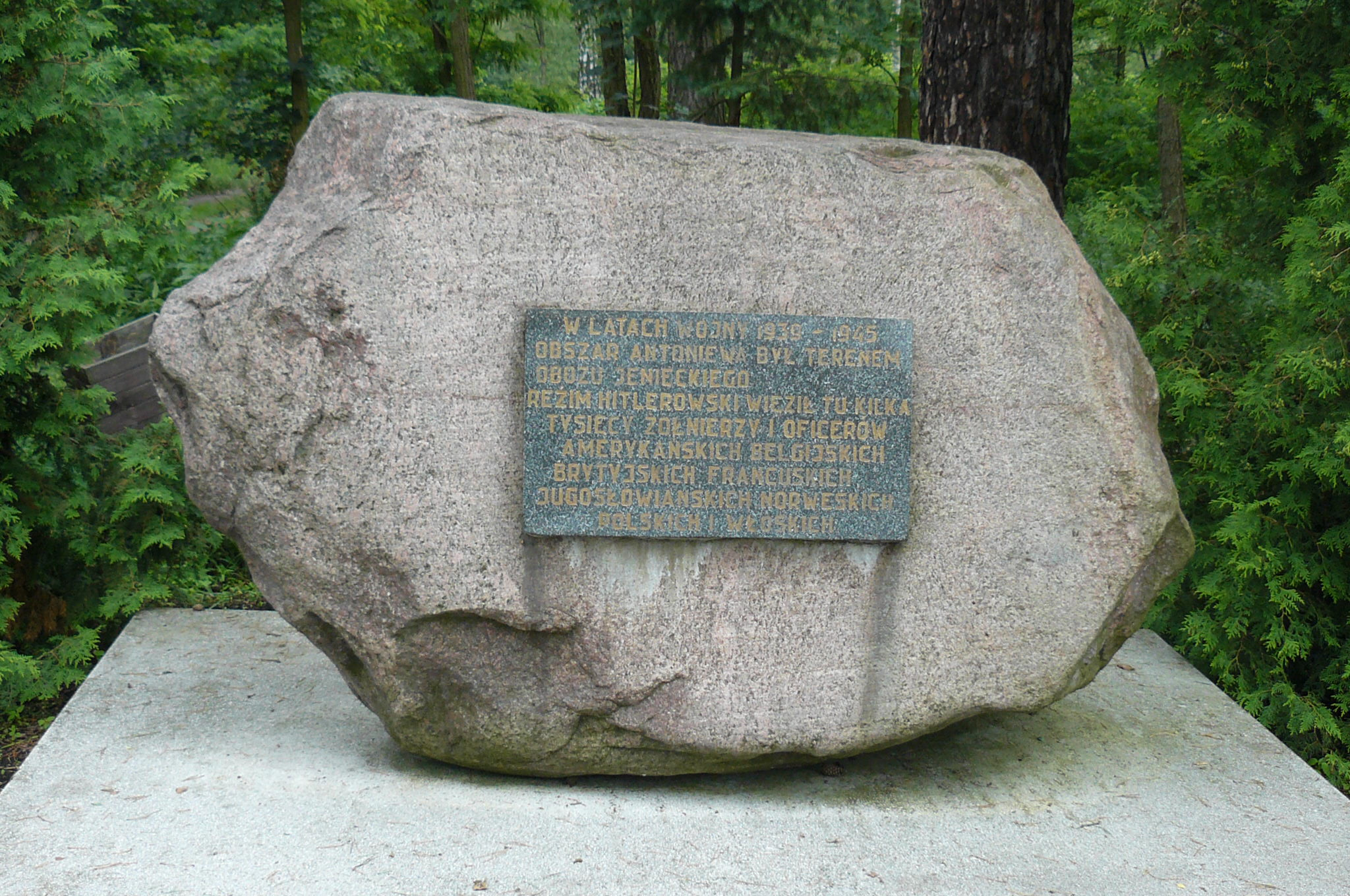 Młodzieżowy Ośrodek Wychowawczy im. Janusza Korczaka w Antoniewie (1914r., brama z 1938r.).